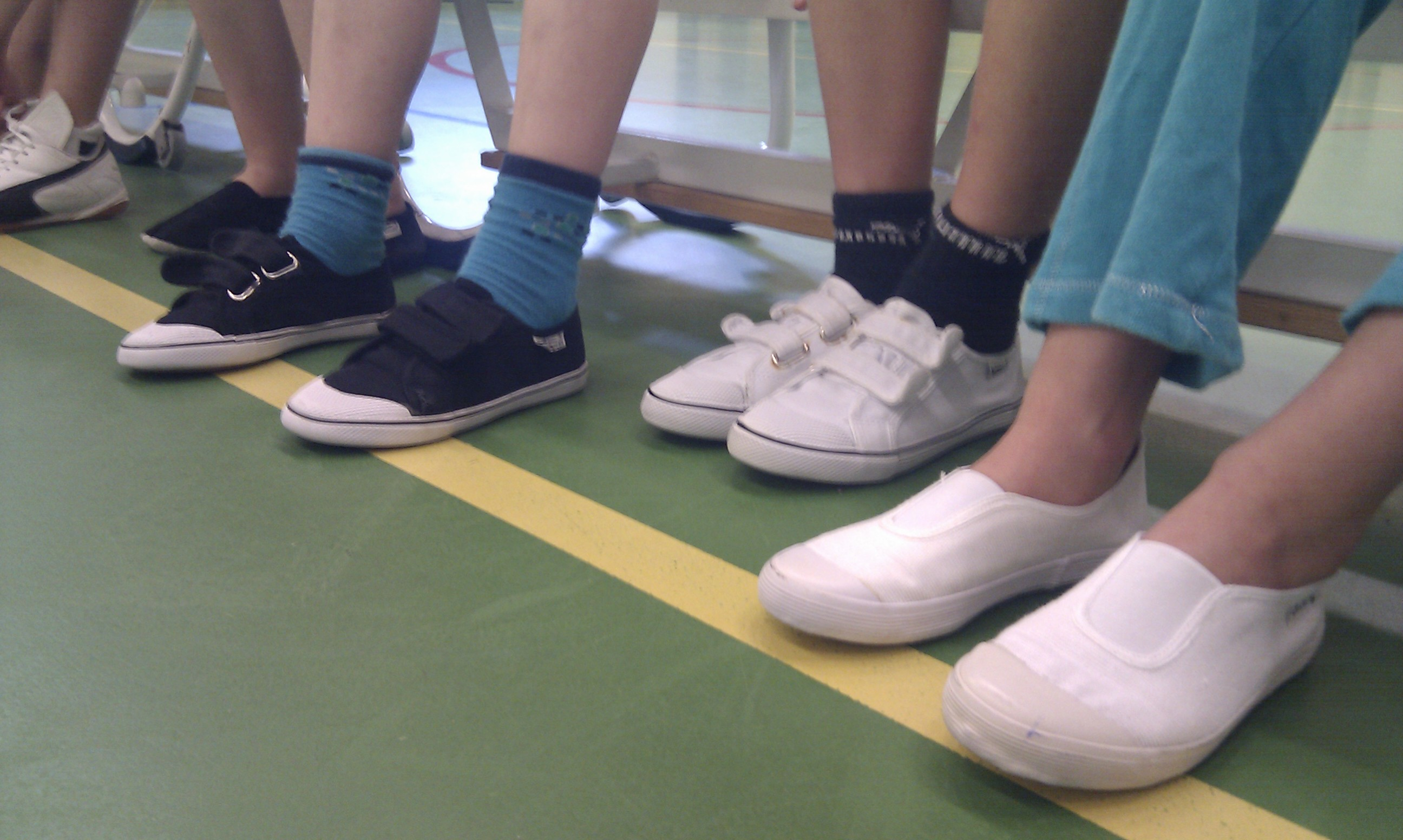 Gymschoenen